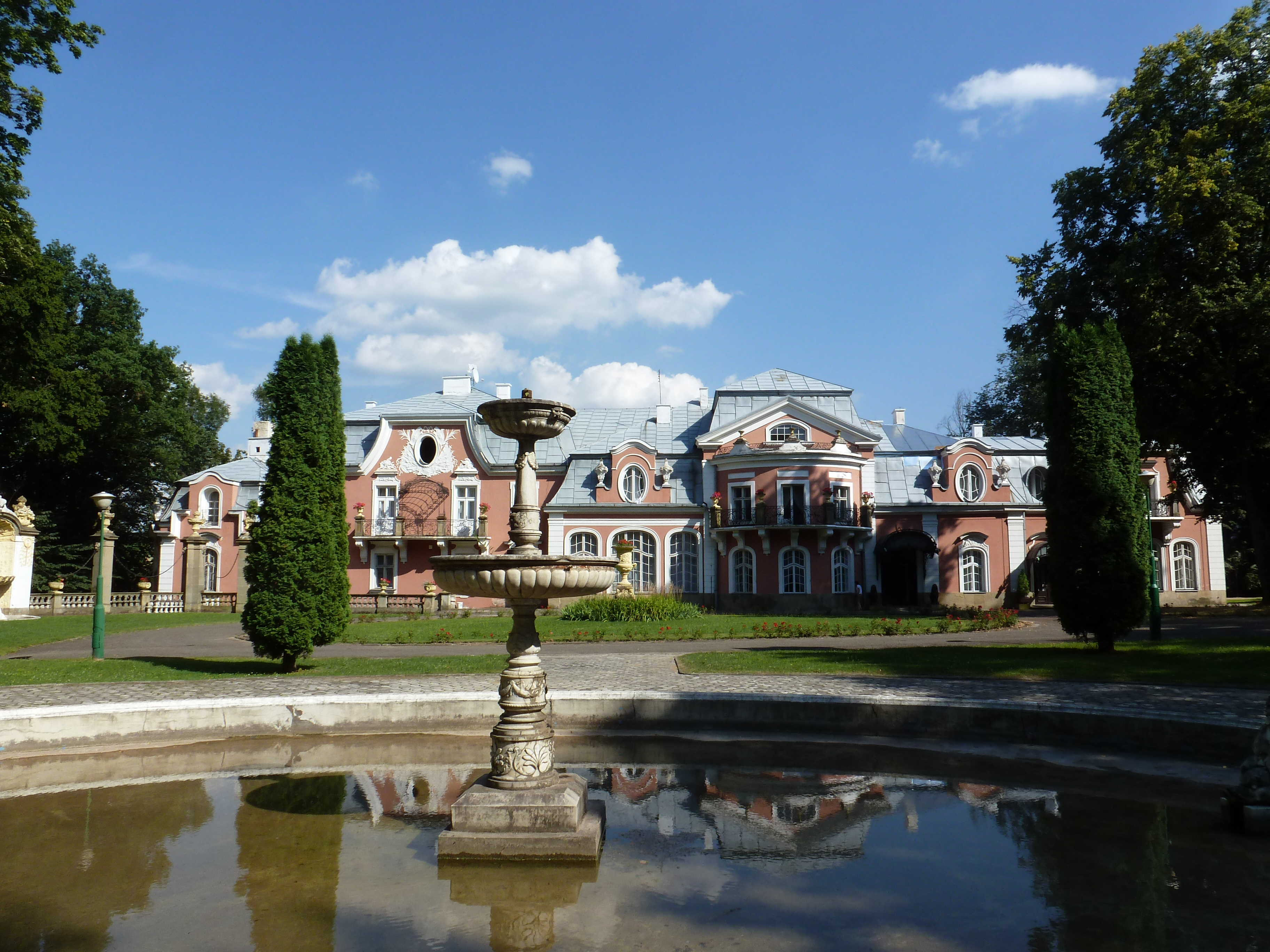 fot. P. Hłyń, Małopolski Instytut Kultury 2013